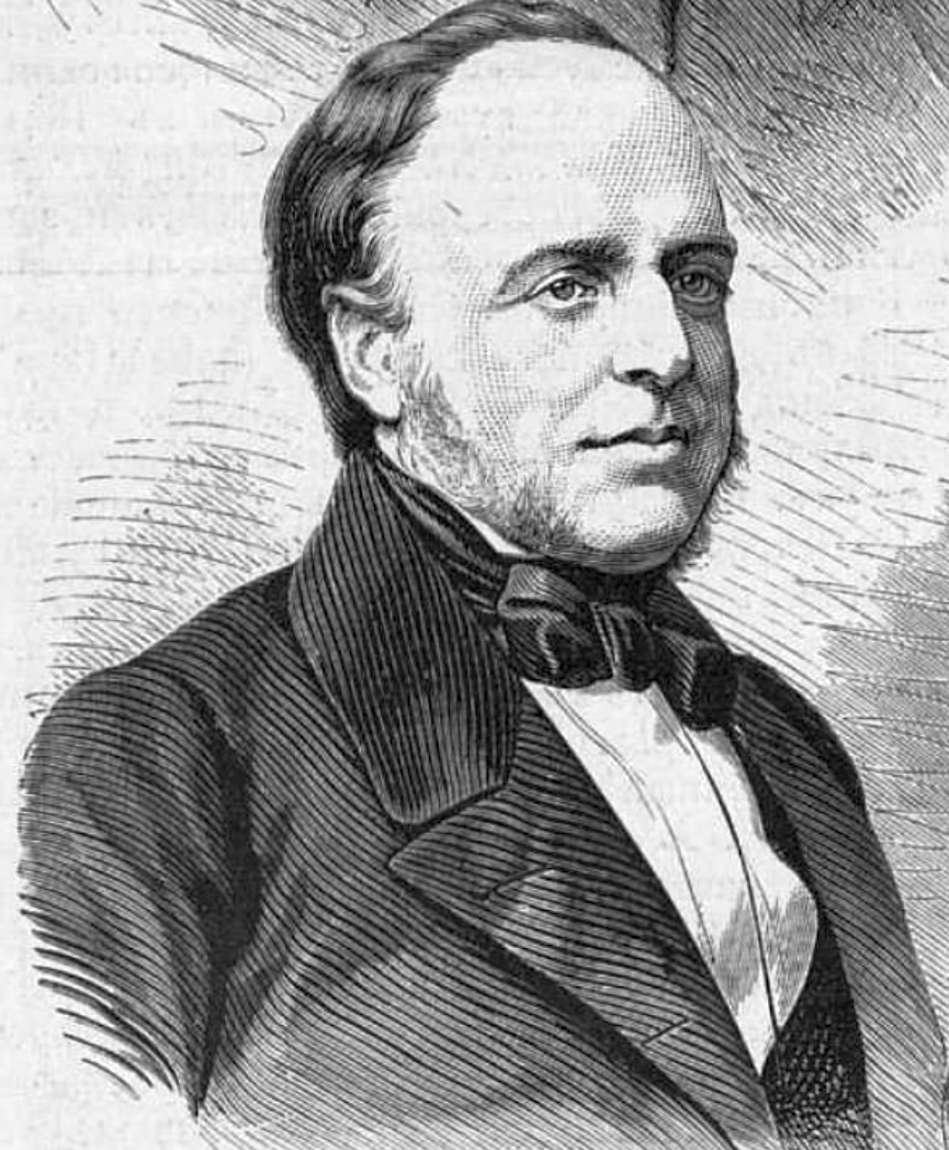 Заблоцкий-Десятовский, Андрей Парфёнович